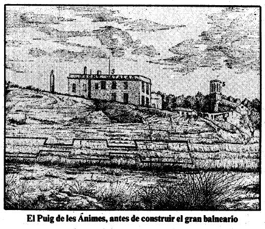 Imatge del Puig de les Ànimes de Caldes de Malavella amb la planta del Balneari Vichy catalan dibuixada al terra